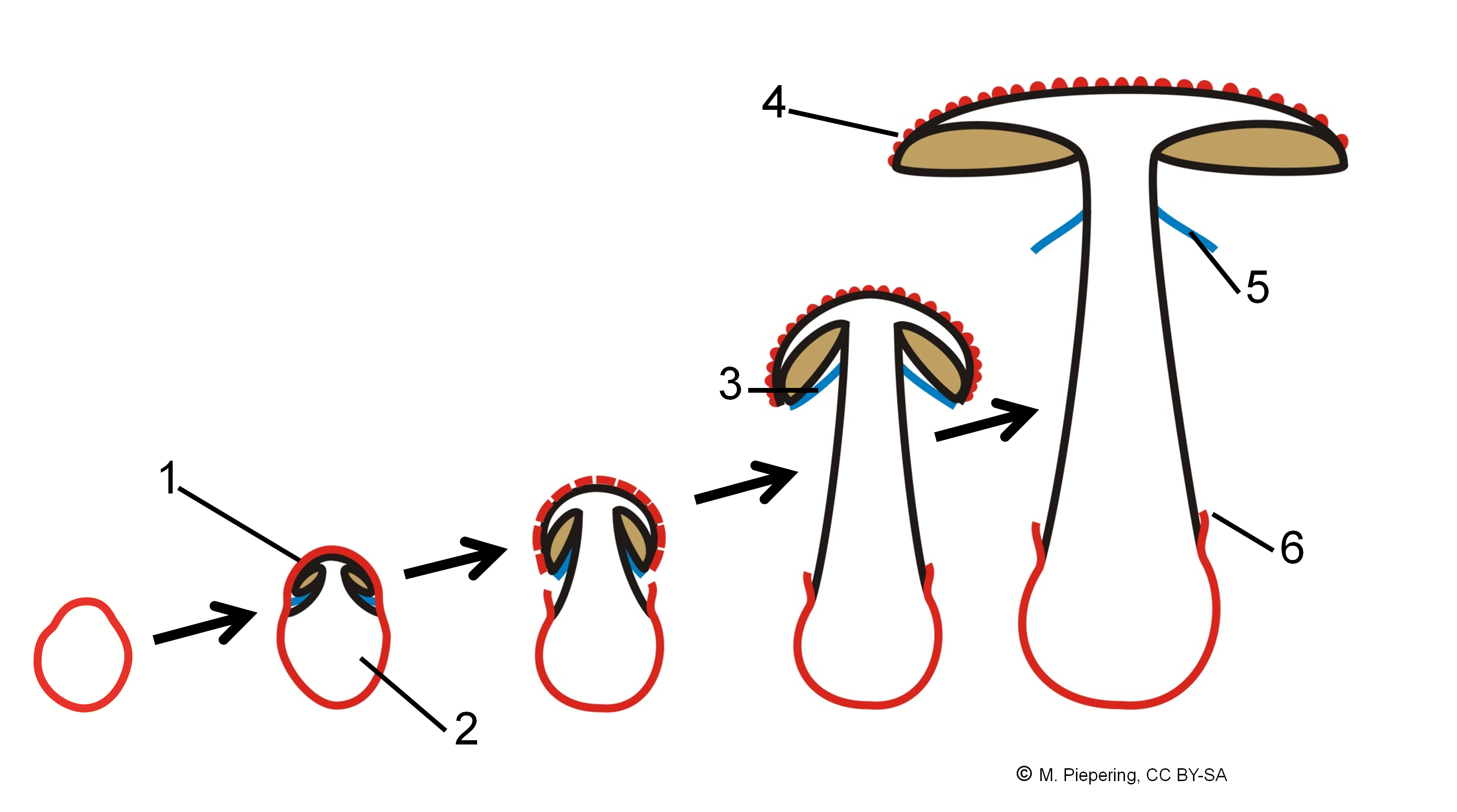 Velum Fungi